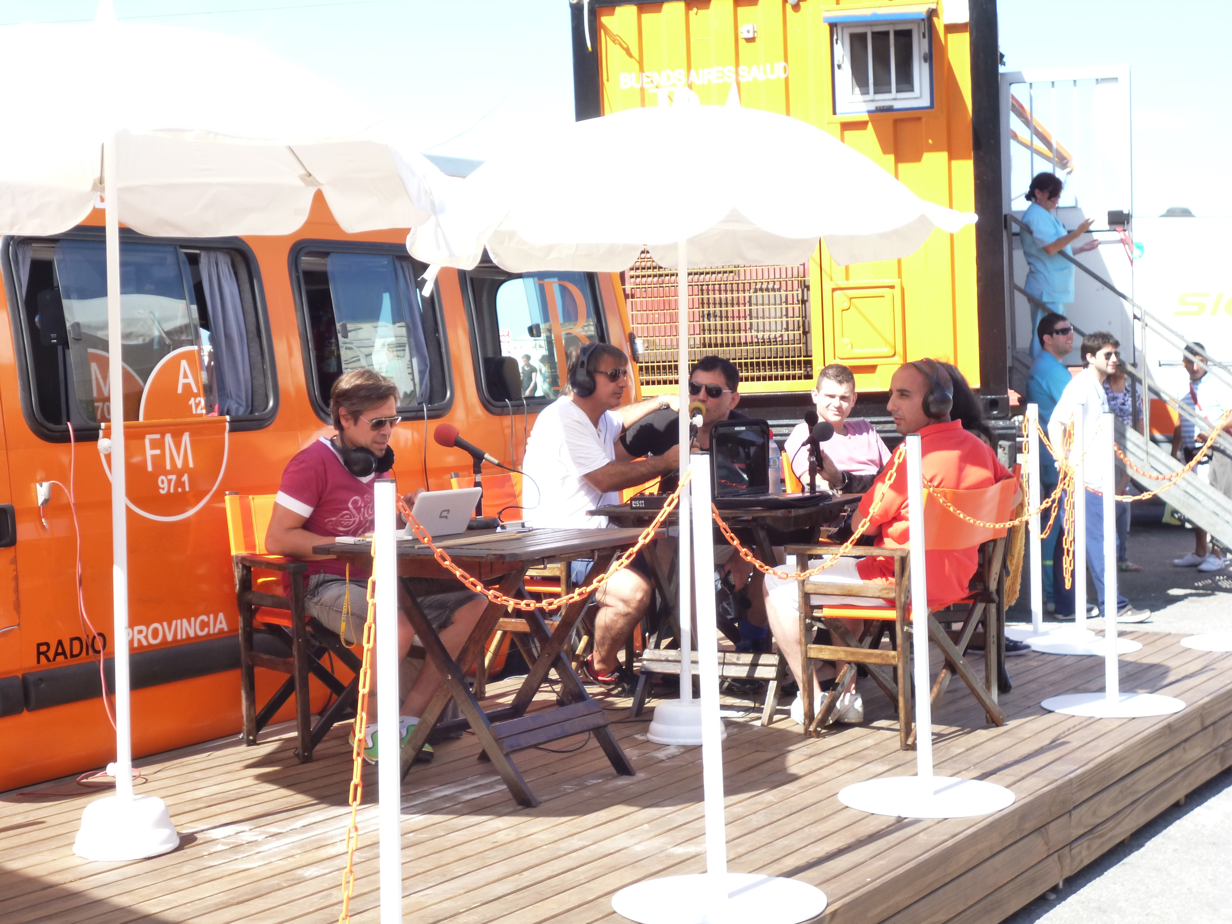 Estudio movil de Radio Provincia ubicado en Mar del Plata